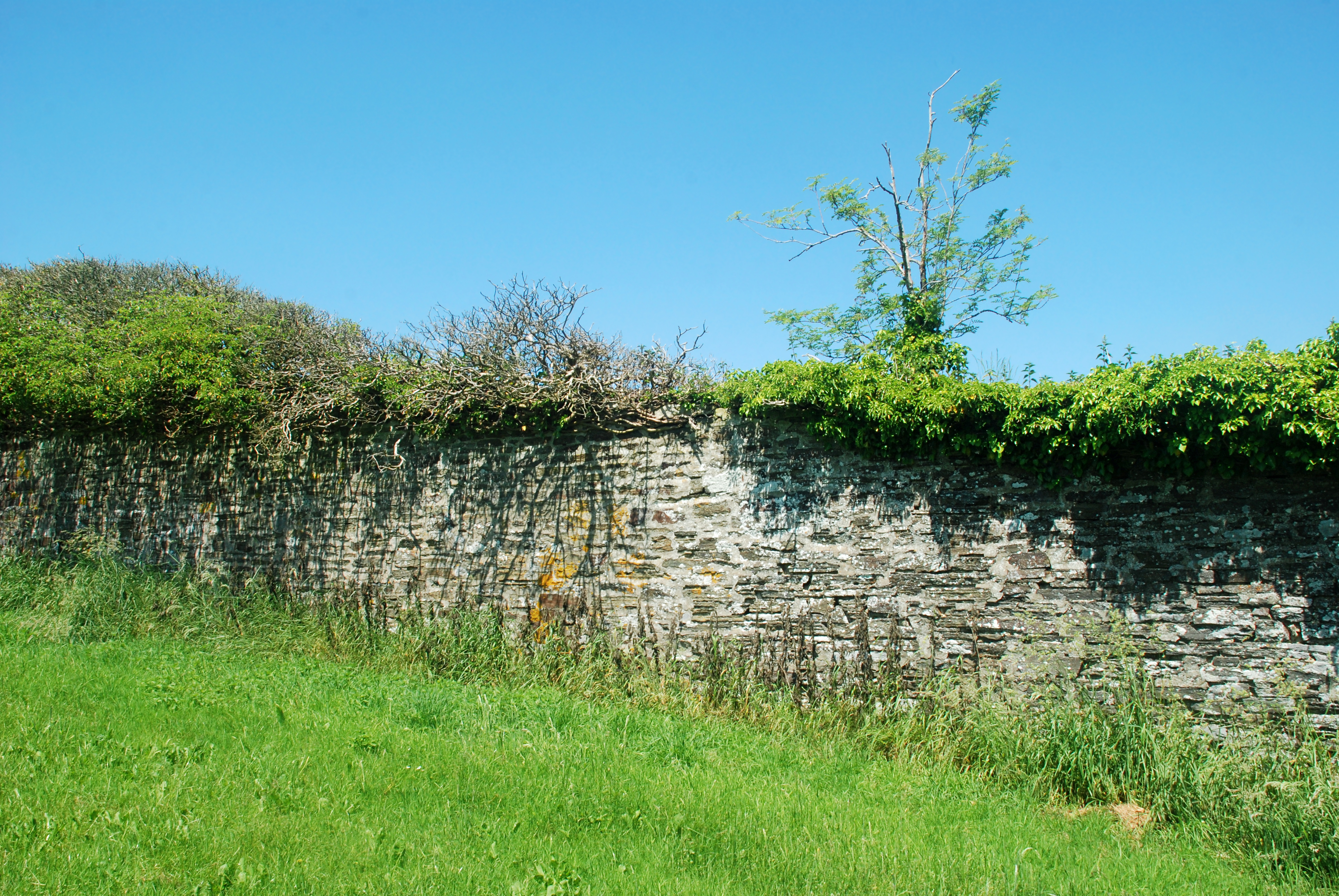 Belgique - Brabant wallon - Mur d'enceinte de l'abbaye de Villers-la-Ville - enceinte intérieure (sur le plateau agricole, côté est)